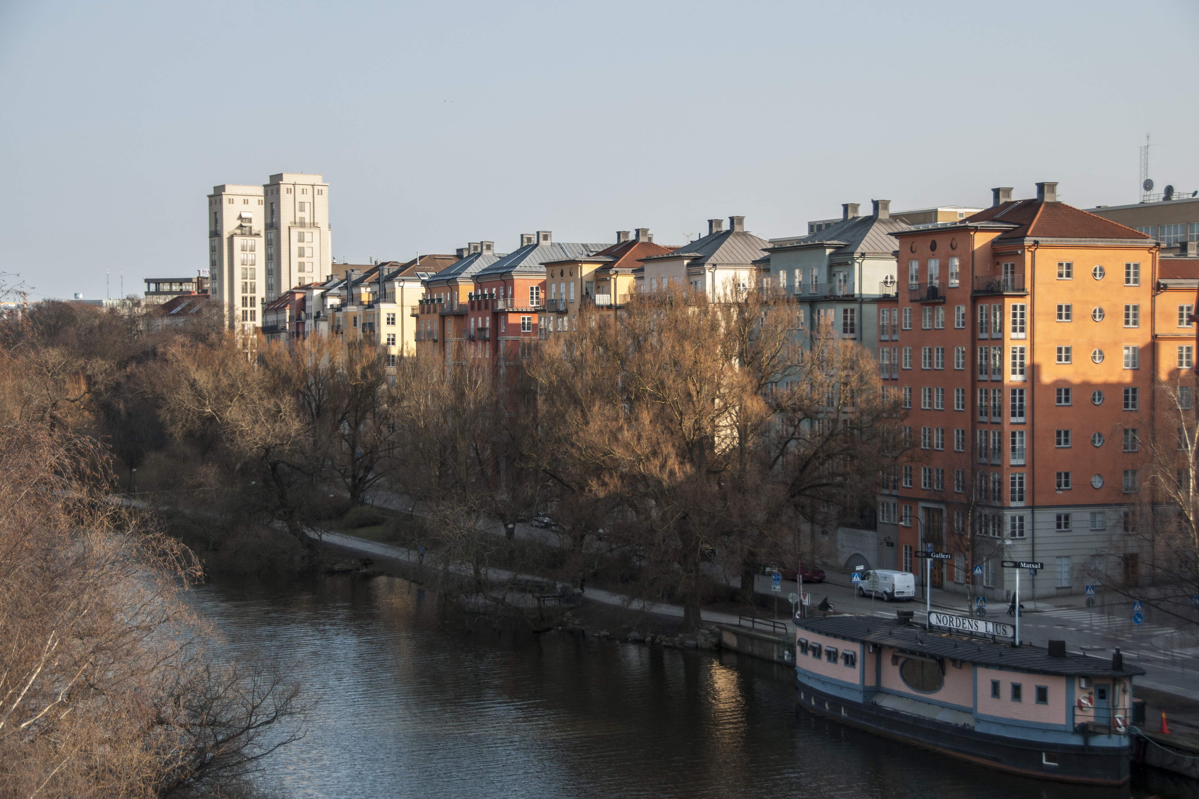 Sankt Eriksområdet utmed Kungsholms strand, sett från Sankt Eriksbron